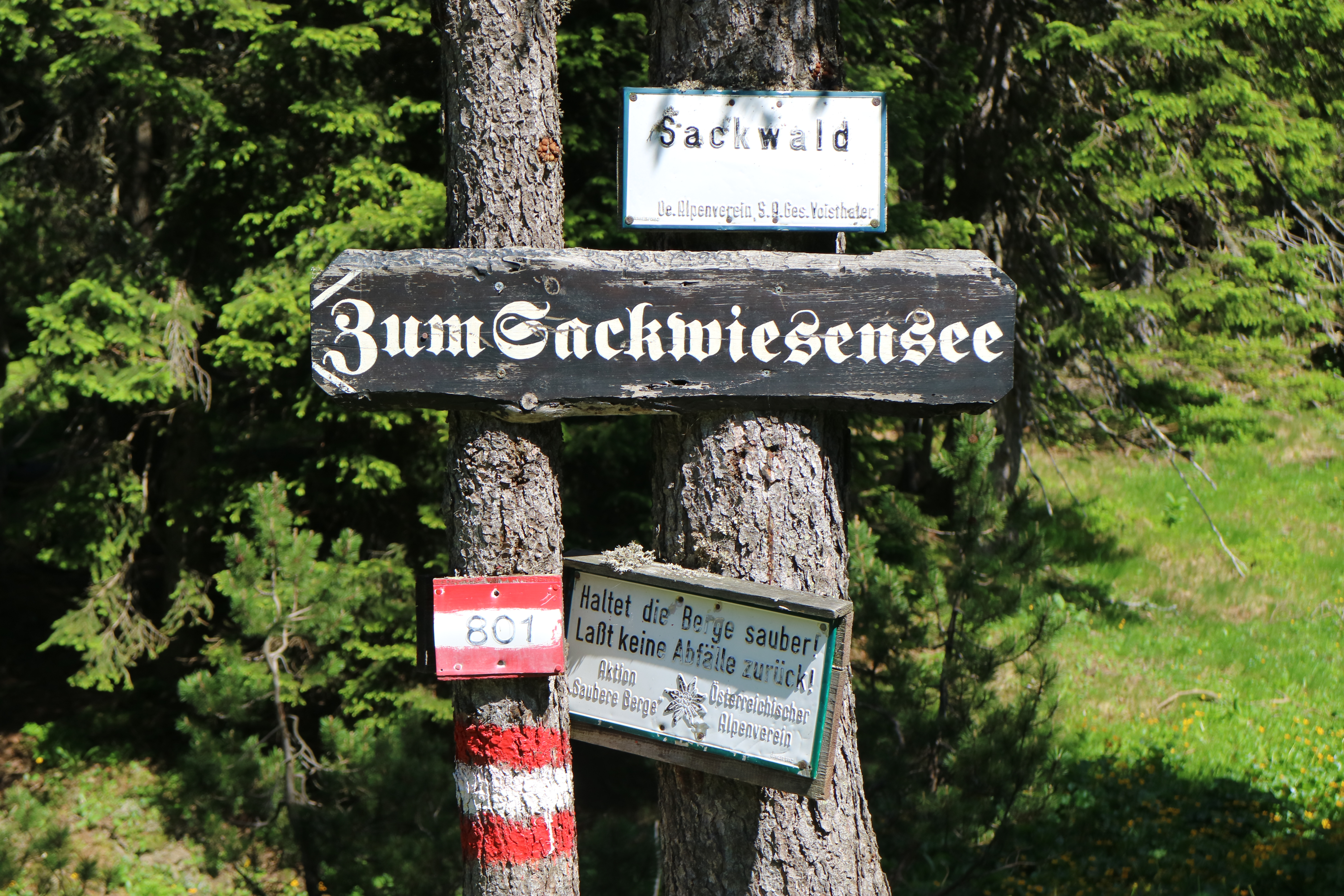 Wegweiser zum Sackwiesensee, Hochschwab (Steiermark)